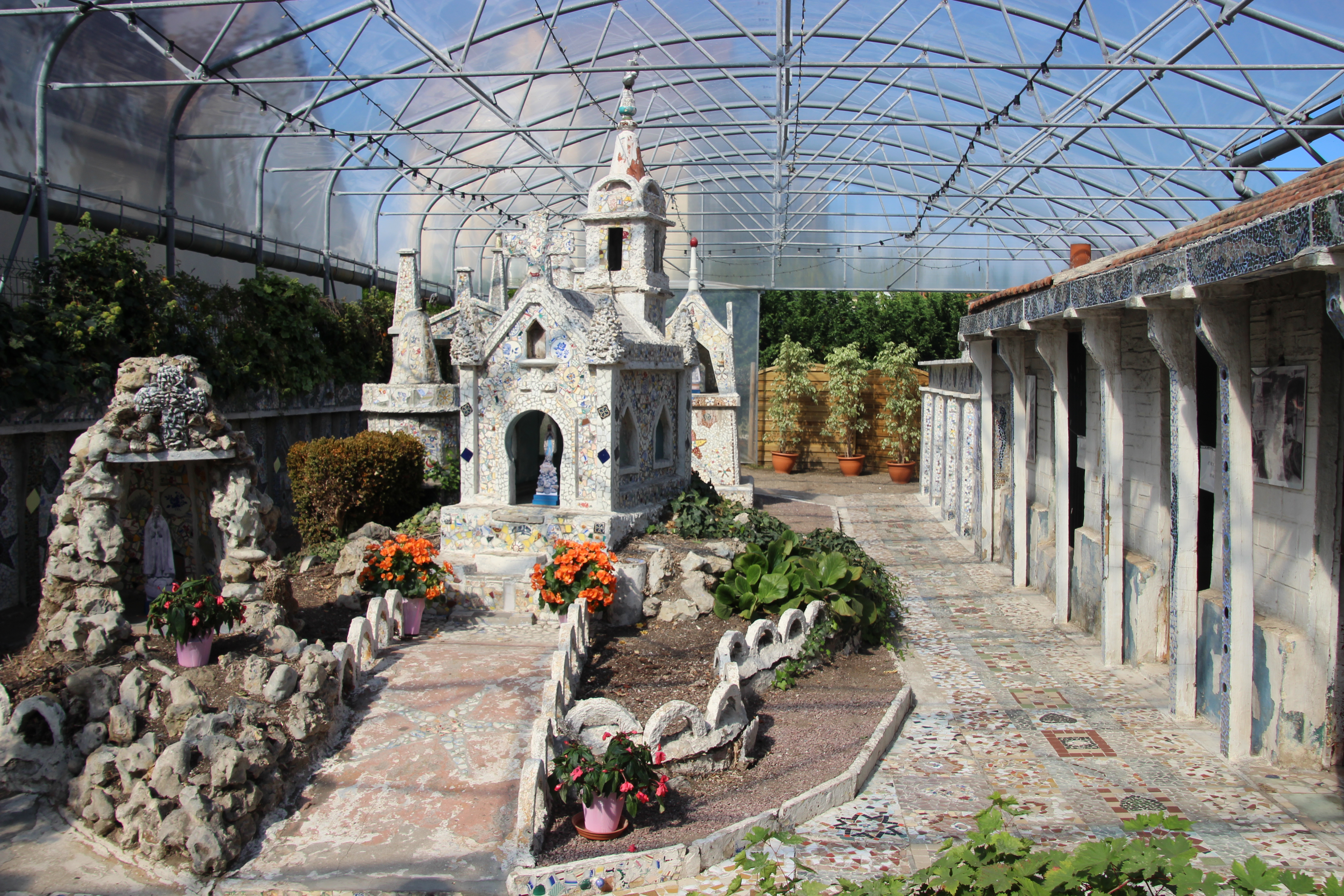 Vue générale de l'intérieur de la maison bleue de Dives-sur-Mer (#100wikicommonsdays r 2 jour 49)